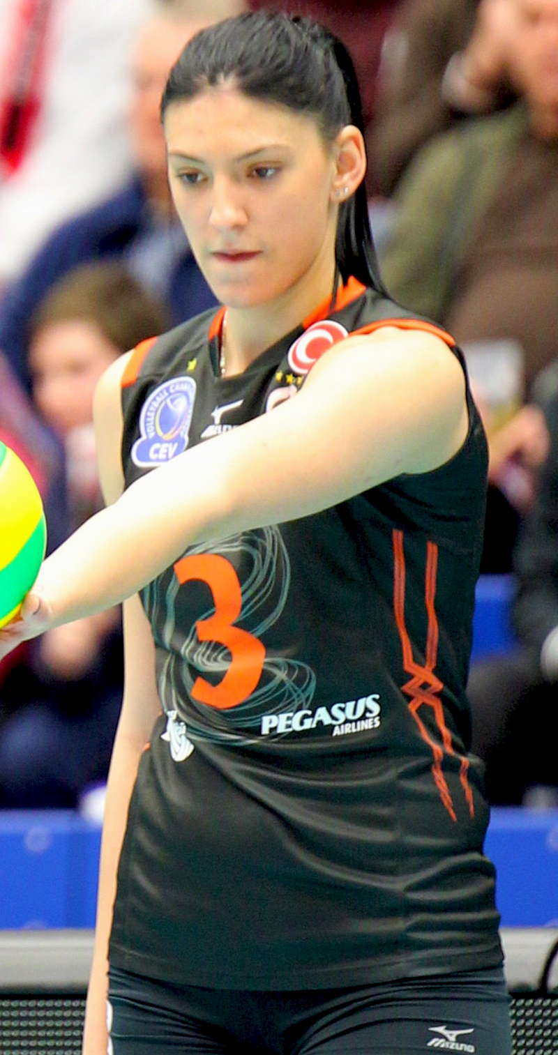 Tijana Boskovic, Eczacıbaşı Istanbul